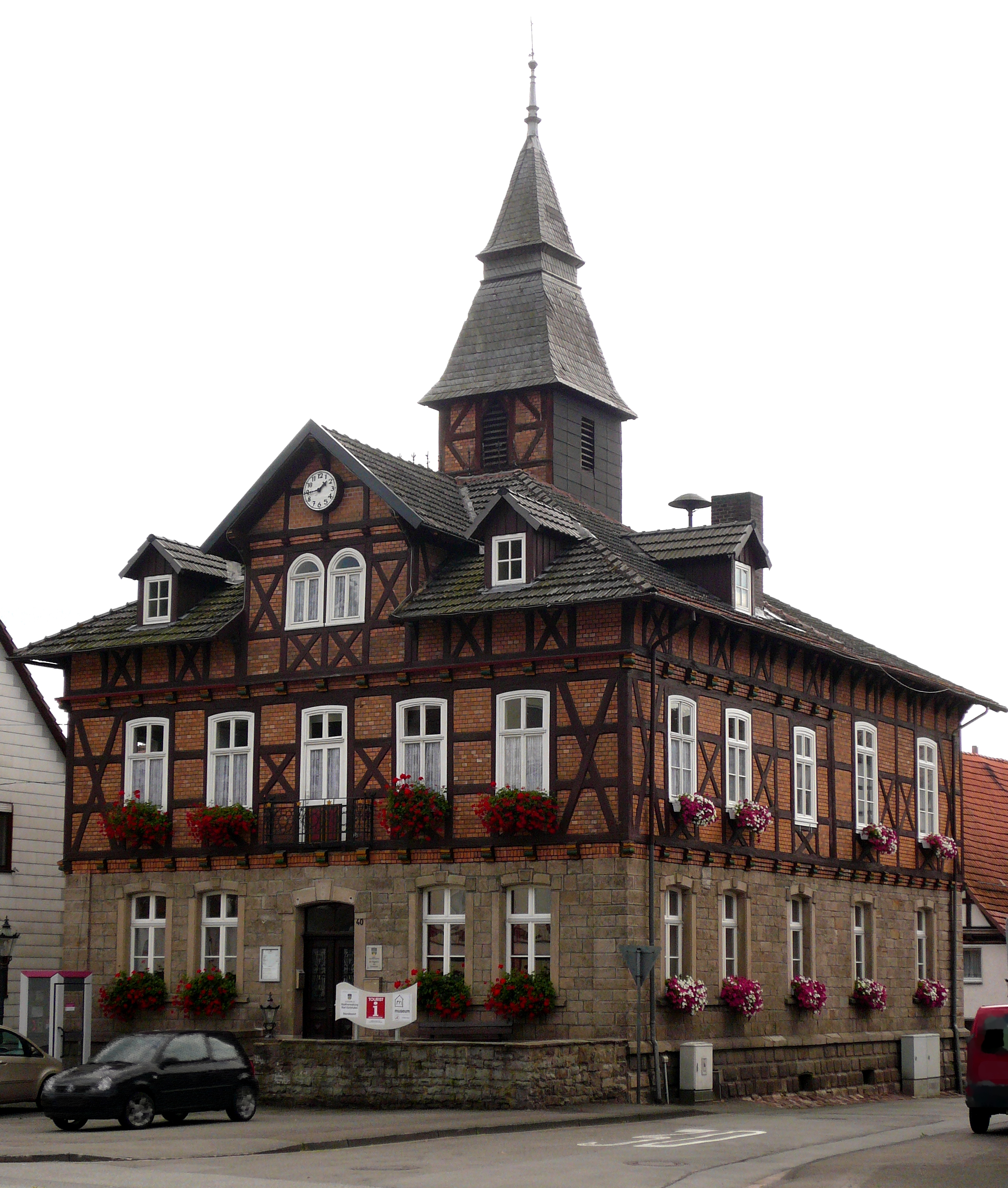 Ehemaliges Rathaus, heute Mueum in Helmarshausen, Stadt Bad Karlshafen, Hessen. Erbaut um 1910